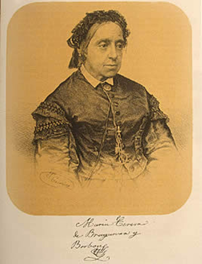 Photograph of Teresa, Princess of Beira